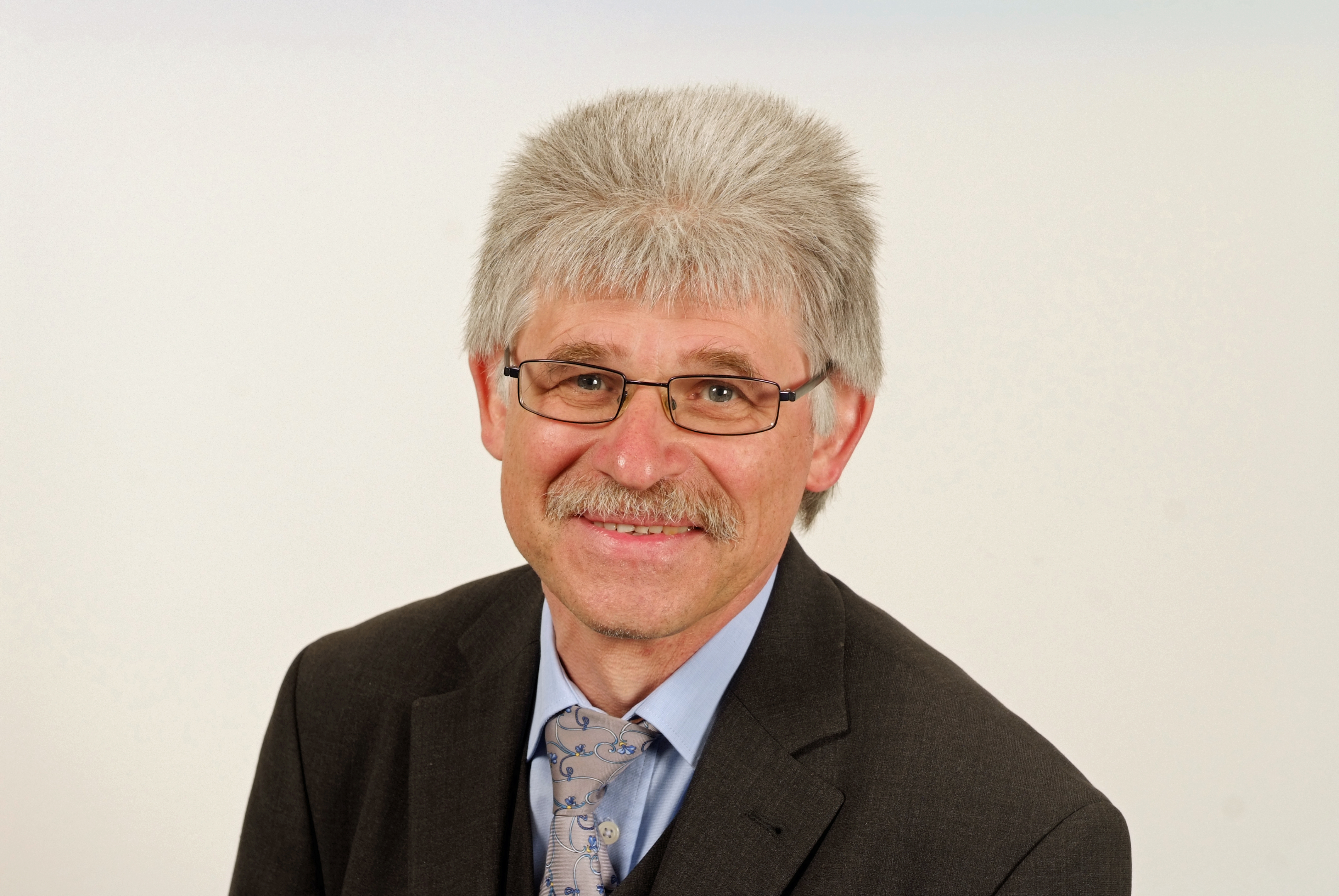 Hans-Jürgen Döring (* 3. Juni 1951; † 29. April 2017) war ein deutscher Politiker (SPD) und Mitglied des Thüringer Landtags